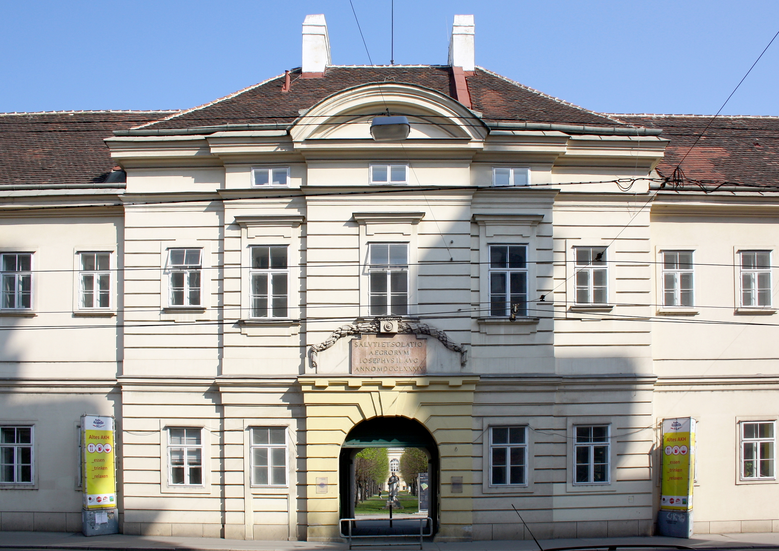 Der Portalbereich des Alten AKH in der Alser Straße in Wien.